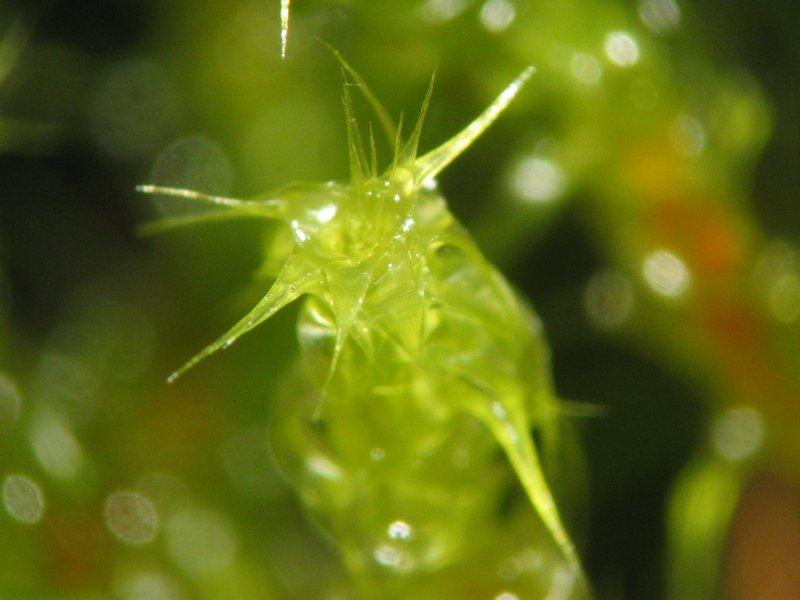 Sparriges Runzelpeter-Moos Rhytidiadelphus squarrosus, Rostock